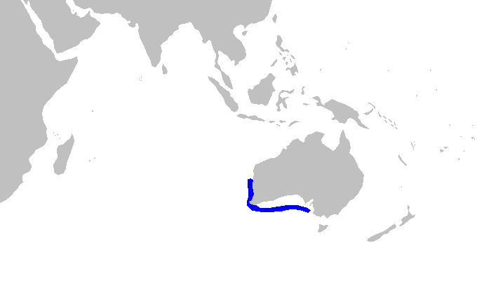 Distribution map for Squatina tergocellata